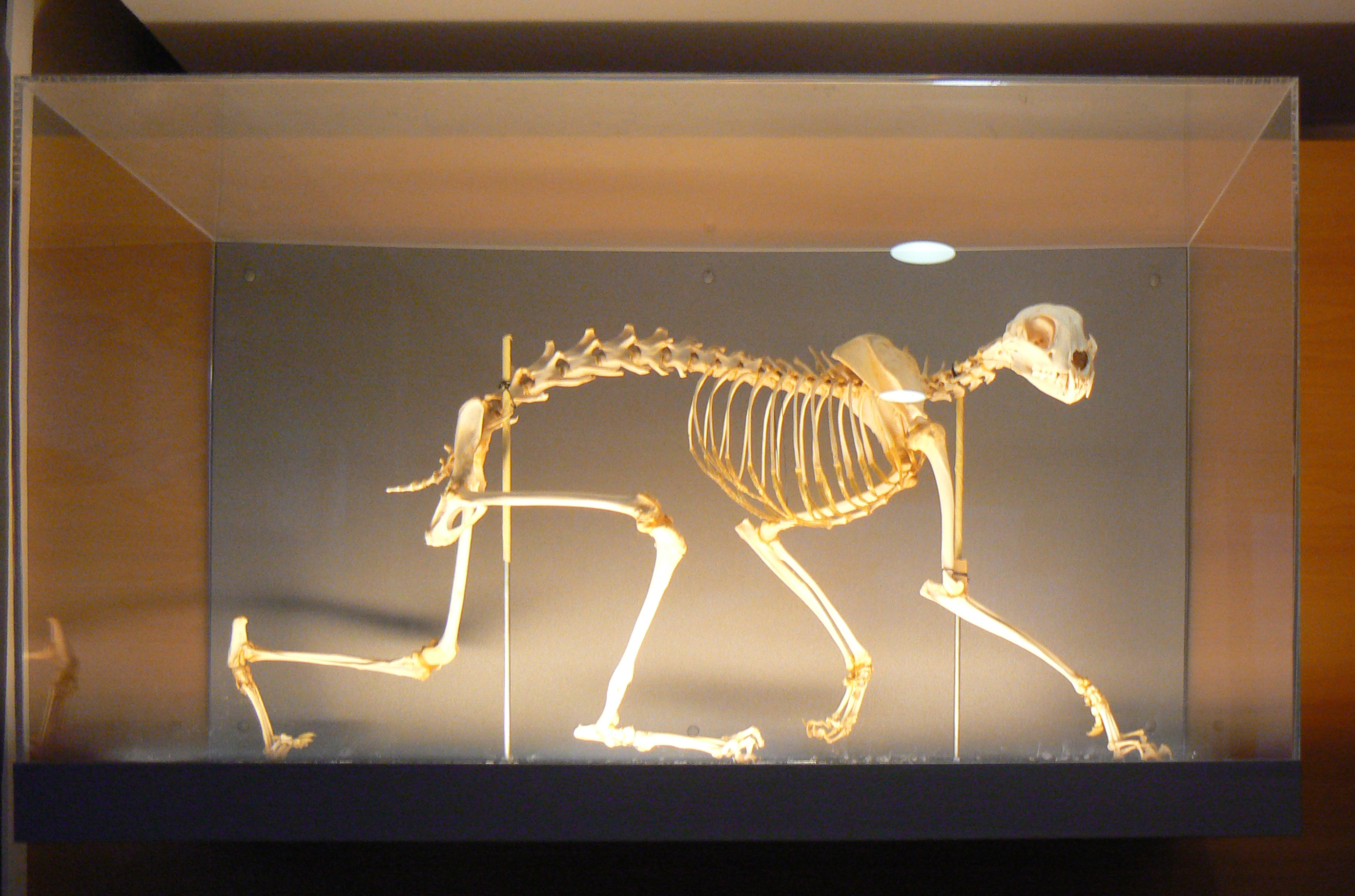 Centro visitatori del Parco nazionale Gran Paradiso "I preziosi predatori", Degioz, Valsavarenche, Valle d'Aosta, Italia. This is a photo of a monument which is part of cultural heritage of Italy.